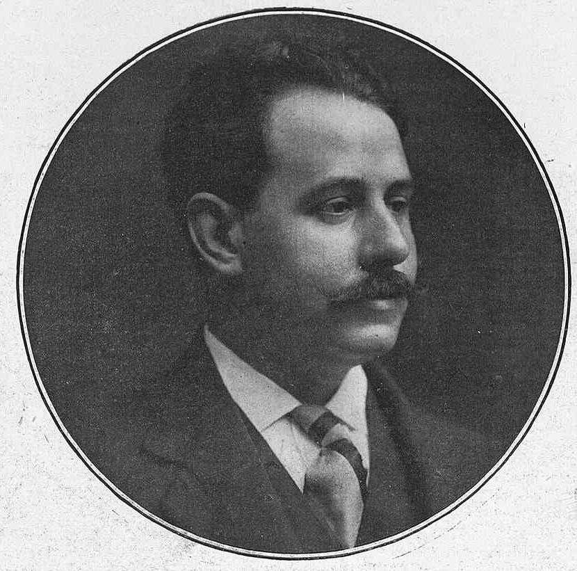 Eduardo Marquina, de Audouard.